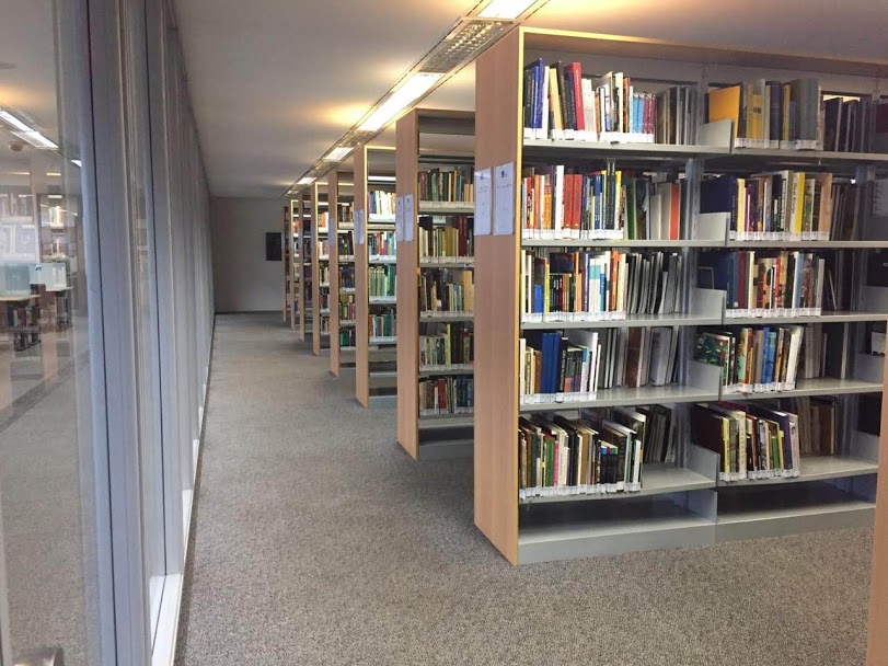 libros de la aBiblioteca